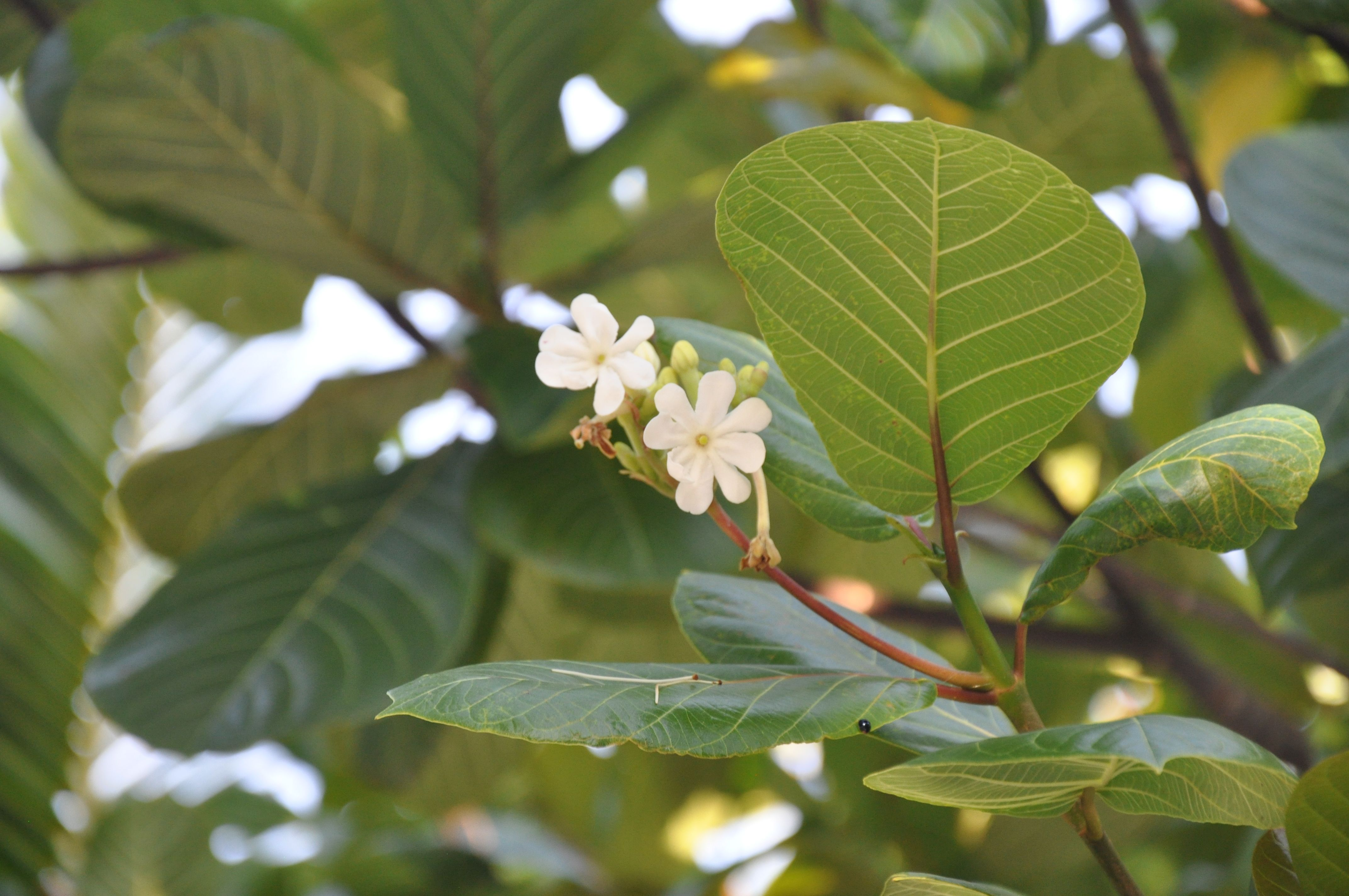 Kahaia, nom puamotu du guettera speciosa